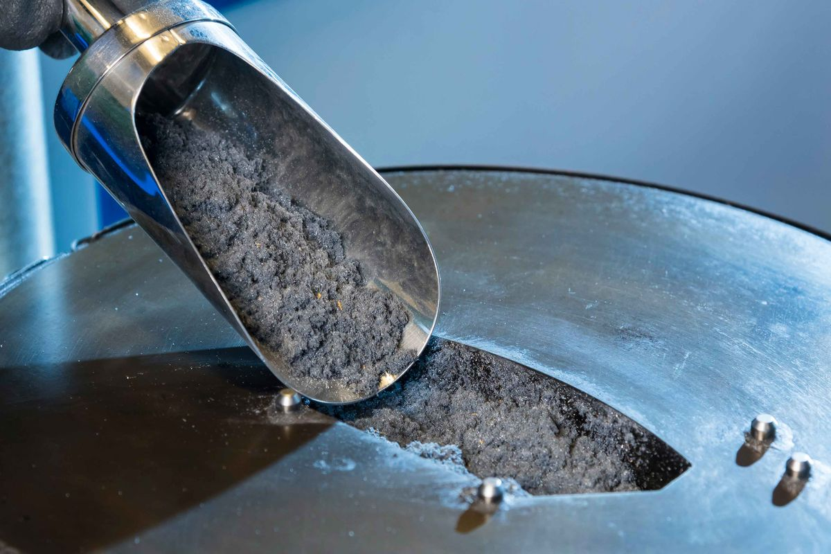 Produkt Metallsulfide von Tribotecc GmbH